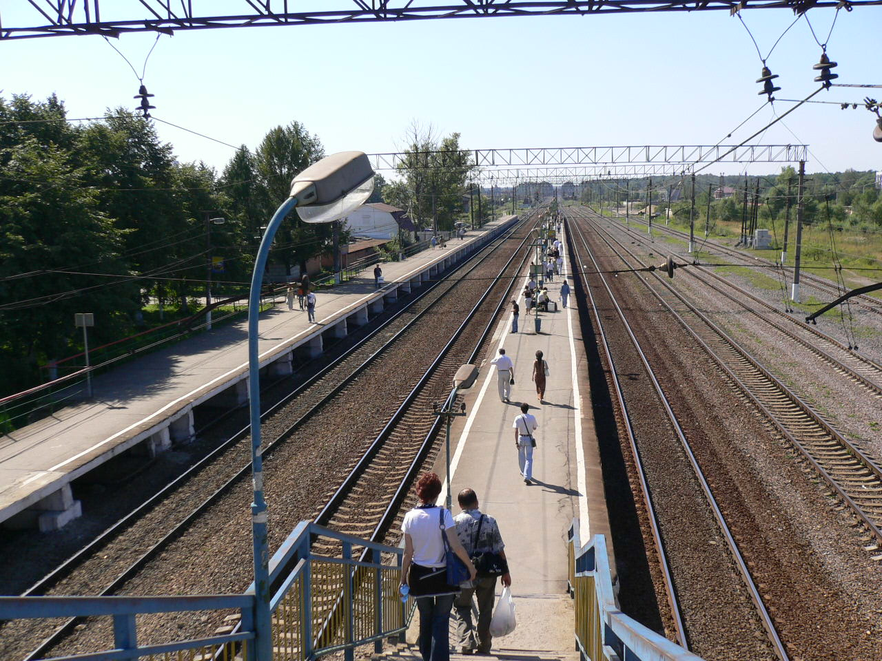 Stolbowaja Столбовая.